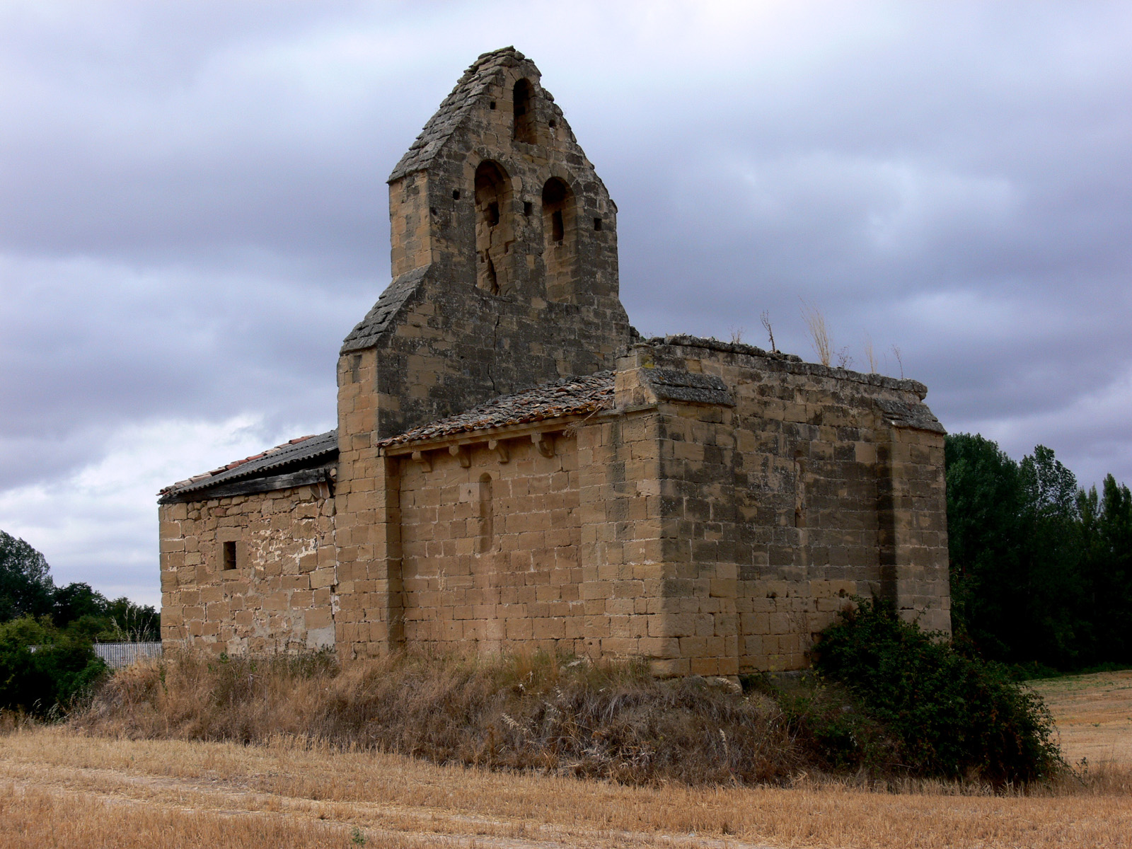 Ermita de San Roman en Ajuarte, despoblado de Casalarreina (La Rioja - España).